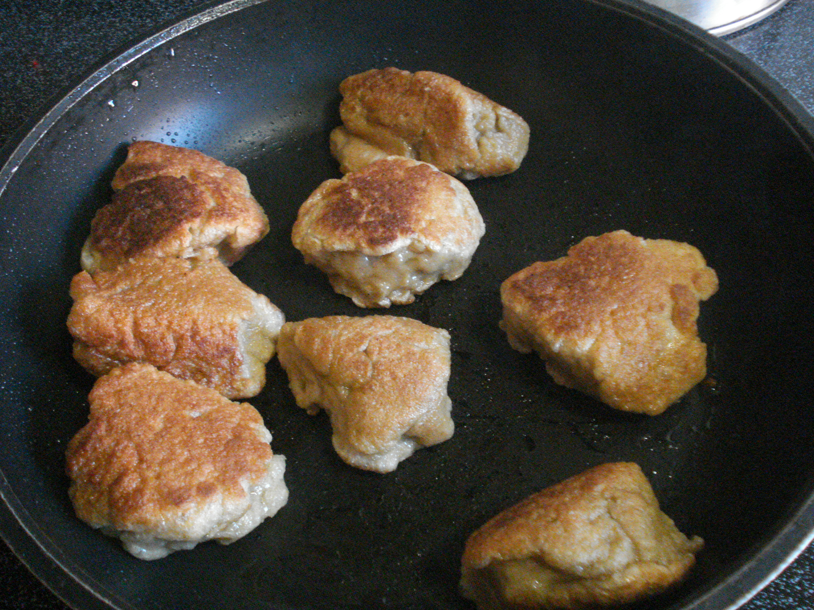 frying seitan nuggets